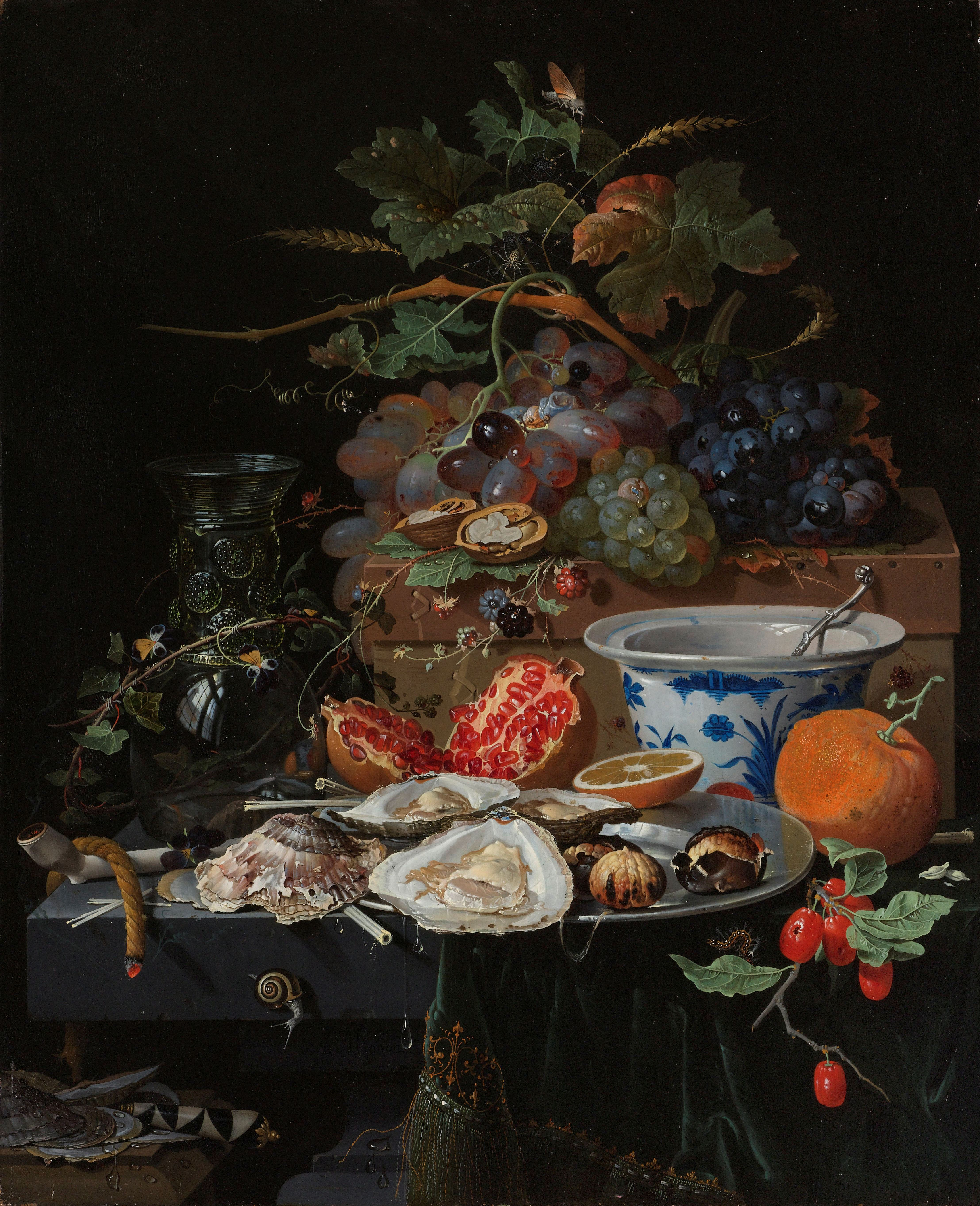 IdentificatieTitel(s): Stilleven met vruchten, oesters en een porseleinen komObjecttype: schilderij Objectnummer: SK-A-2329Opschriften / Merken: signatuur, onder de tafelrand: ‘Ab Mignon’Omschrijving: Stilleven met vruchten, oesters en een porseleinen kom. Op een stenen tafel een zilveren bord met oesters, fruit, een porseleinen kom, een omgekeerde roemer en een tros druiven op een houten doos. Verder ook slakken en insecten.VervaardigingVervaardiger: schilder: Abraham Mignon (vermeld op object)Datering: 1660 - 1679Fysieke kenmerken: olieverf op paneelMateriaal: paneel olieverf Afmetingen: drager: h 55 cm. × b 45 cm. buitenmaat: d 6,8 cm. (drager incl. SK-L-4168 & opbouw tbv klimaat)OnderwerpWat: foodstuffs; still life of foodstuffsmolluscs: oysterfruitsglass, rummerVerwerving en rechtenCredit line: Aankoop met steun van de Vereniging RembrandtVerwerving: aankoop 1908Copyright: Publiek domein